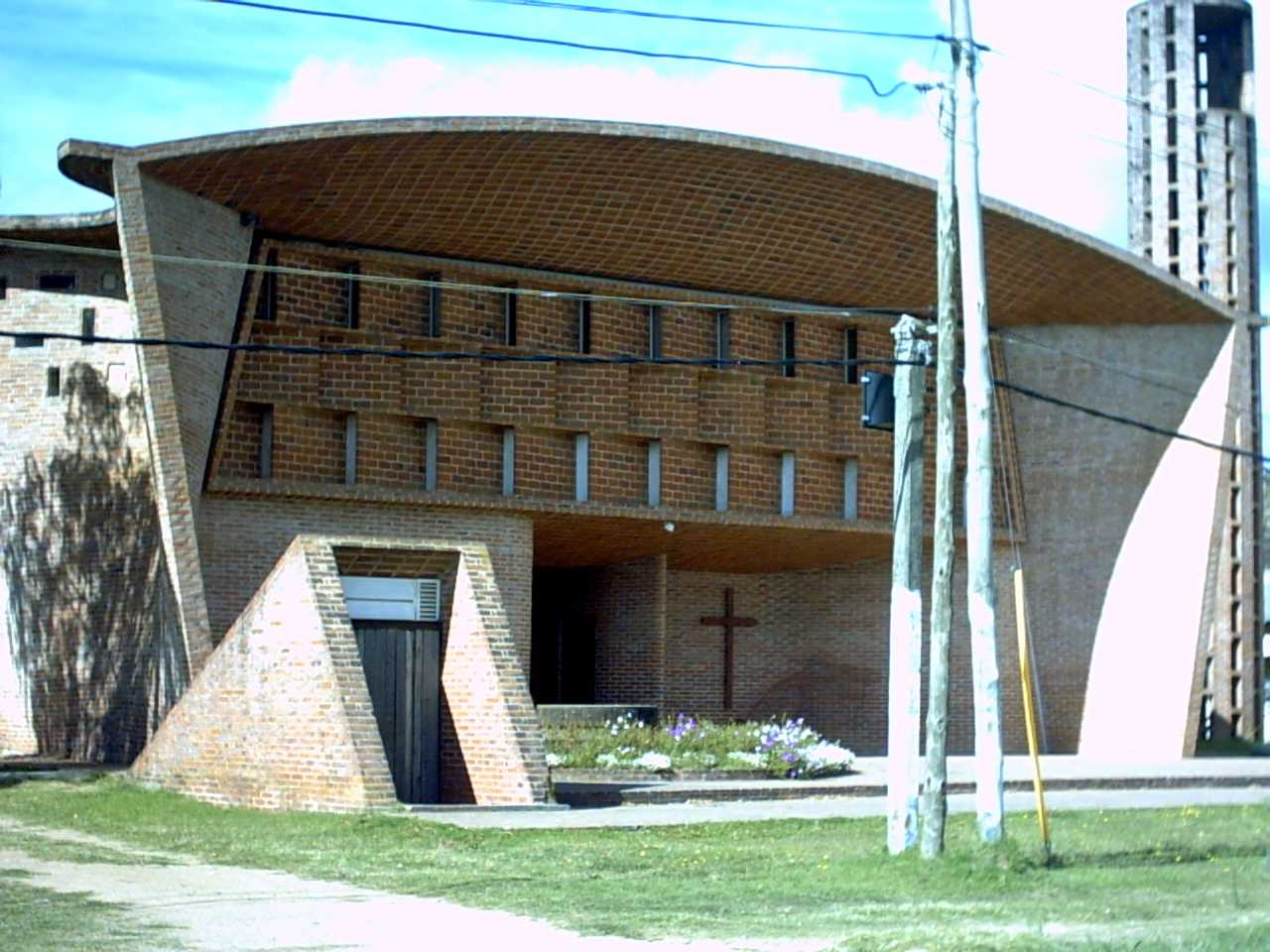 Parroquia del Cristo Obrero. Iglesia de Atlántida, diseñada por Eladio Dieste.